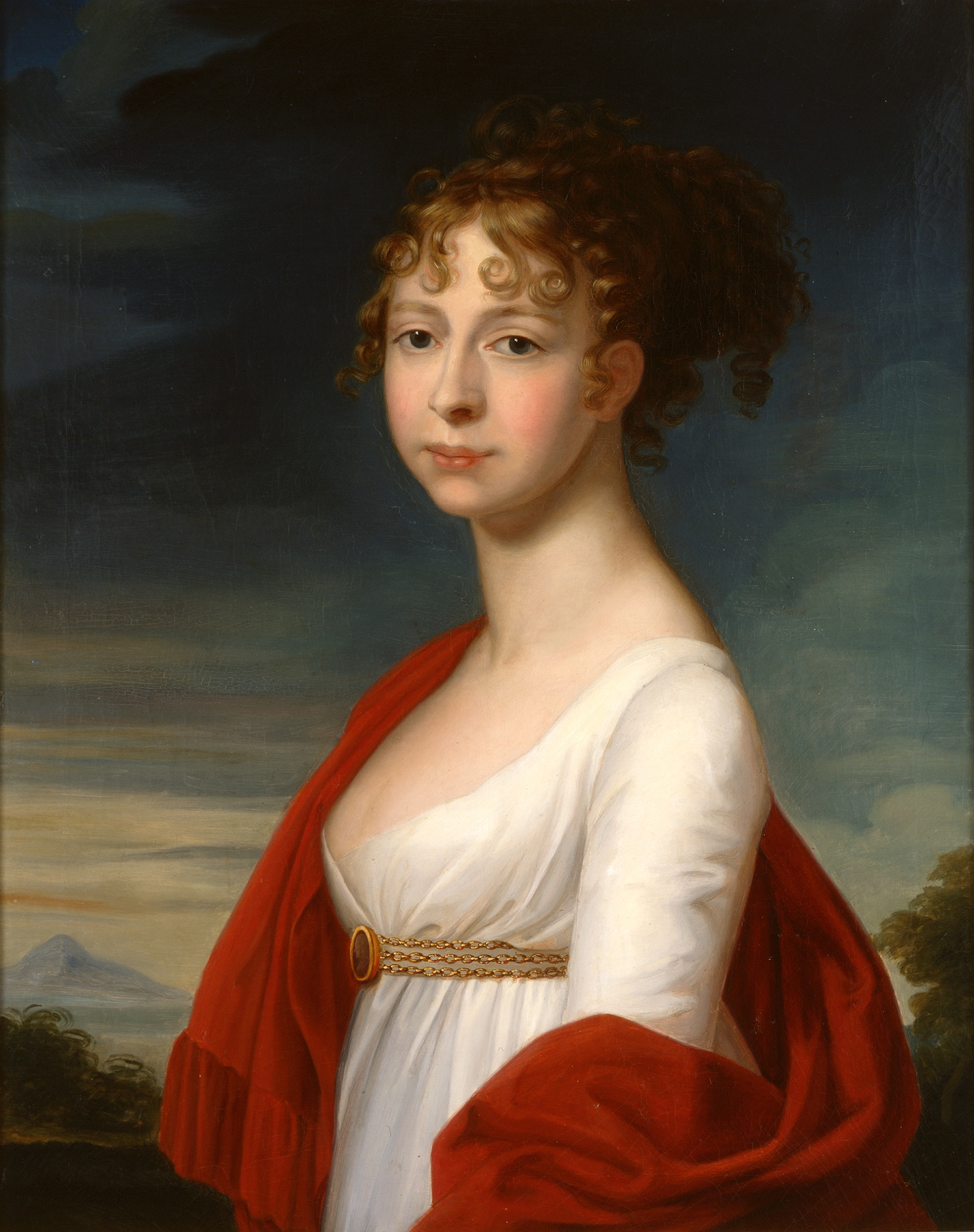 Maria Pavlovna (Grand Duchess of Saxe-Weimar-Eisenach)